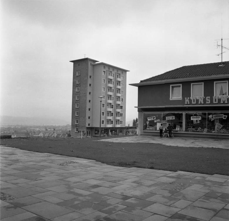 Wohnungsbau: Eschwege/Hessen 17. - 20. Juli 1961